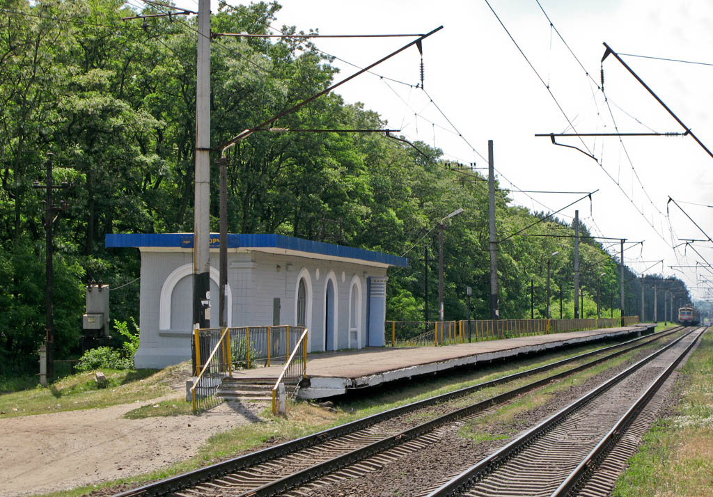 Платформа парного напрямку